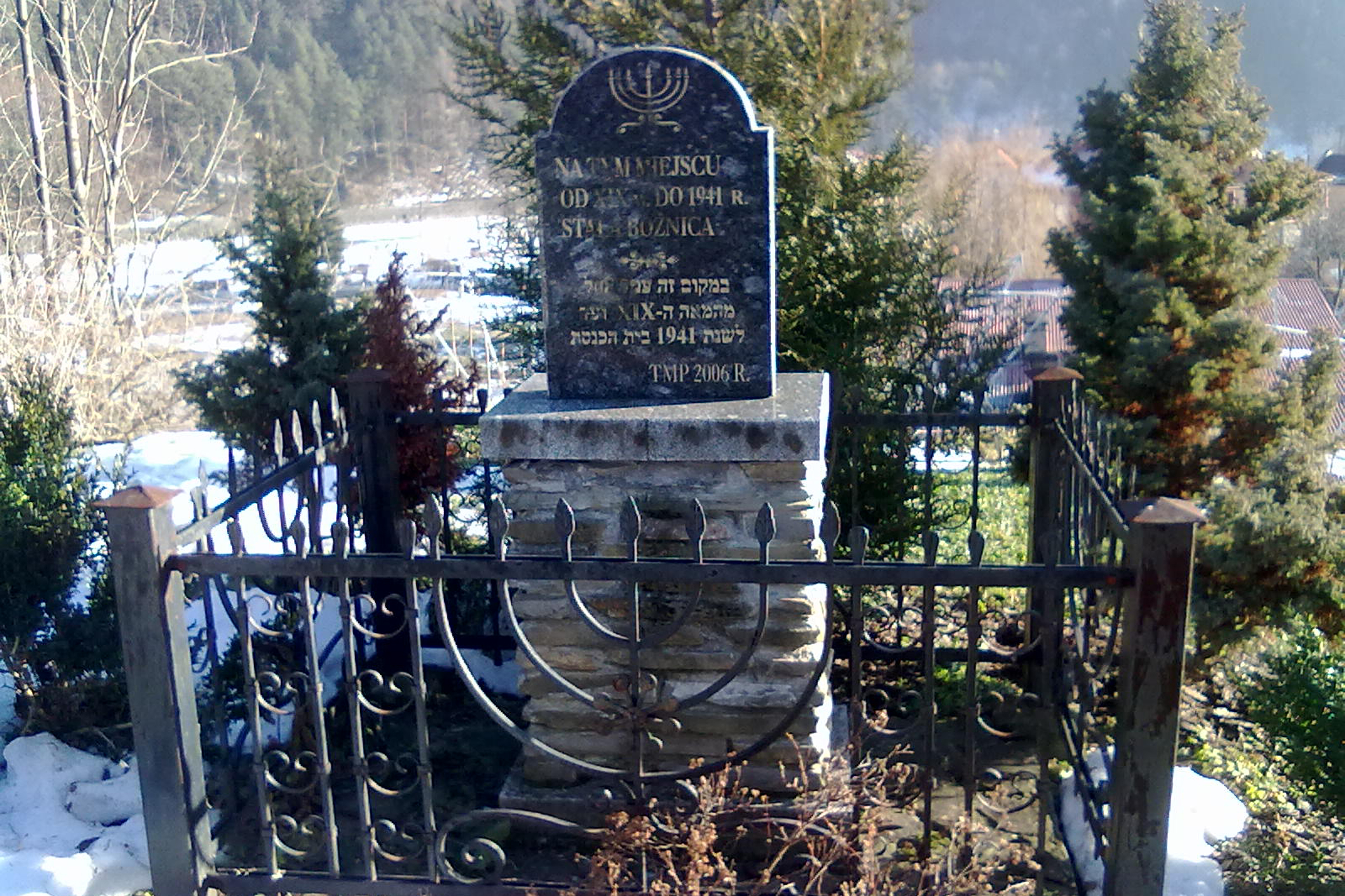 Tablica pamiątkowa w miejscu zburzonej podczas okupacji bóżnicy w Piwnicznej Zdrój